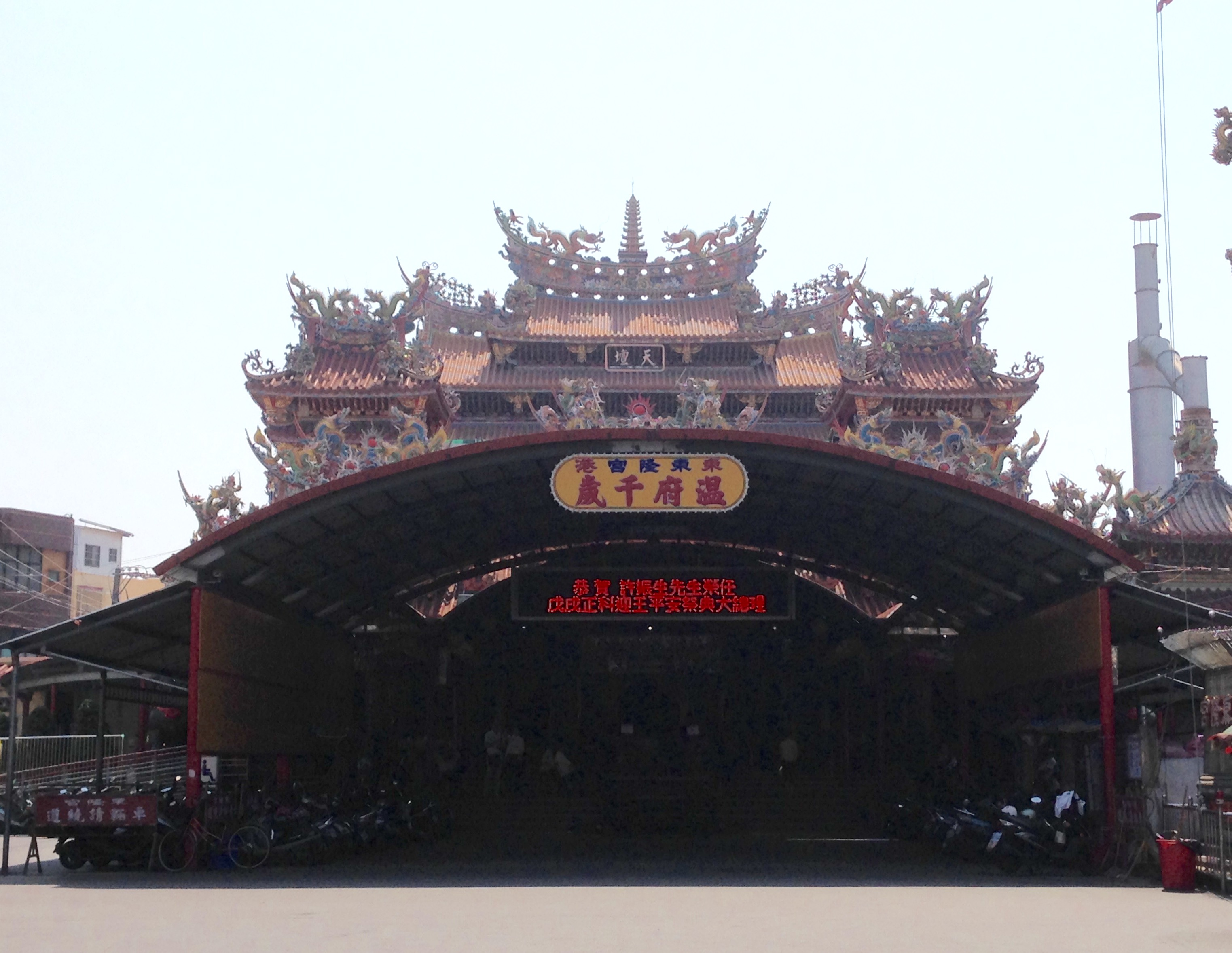 中文（台灣）: 東港東隆宮大殿